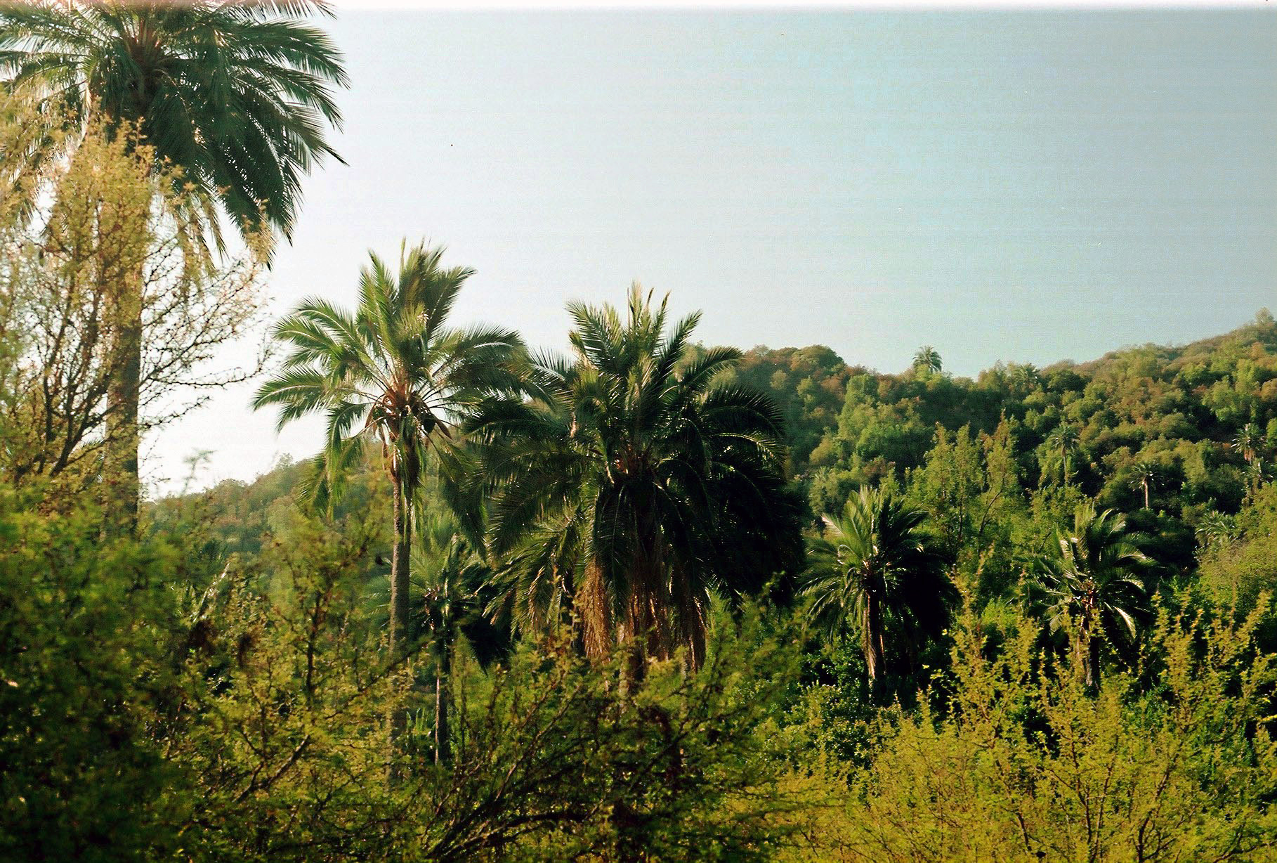 Parque Nacional La Campana - Region de Valparaiso La palma chilena, especie cuyo nombre científico es Jubaea chilensis, pertenece a la familia de las palmáceas, es la palma más austral del mundo y es endémica (nativa) de Chile. Se distribuye en forma natural entre La Serena y Talca, aproximadamente; encontrándose algunos ejemplares hasta la zona de Arauco. Se reconoce porque es la única palmera de tronco liso, además presenta un angostamiento a los ocho a diez metros de altura, que ocurre al llegar a la madurez. Su tronco es cilíndrico, de color grisáceo, cuya base tiene un diámetro variable entre 0,7 y 1 m; pudiendo llegar a medir hasta veinticinco metros de altura. Por definición, las palmas no son árboles, sus troncos no son de madera, ellos están compuestos de fibras. Por lo tanto, son hierbas gigantescas, como un tipo de pasto gigante, único en el mundo, muy sensible a la depredación y que hay que preservar. Entre las características más llamativas de la palma chilena está su lento crecimiento (llega al estado de madurez recién a los sesenta años) y su capacidad de resistir el fuego debido a componentes de su corteza, además, crece principalmente en las laderas de exposición norte de los cerros áridos.